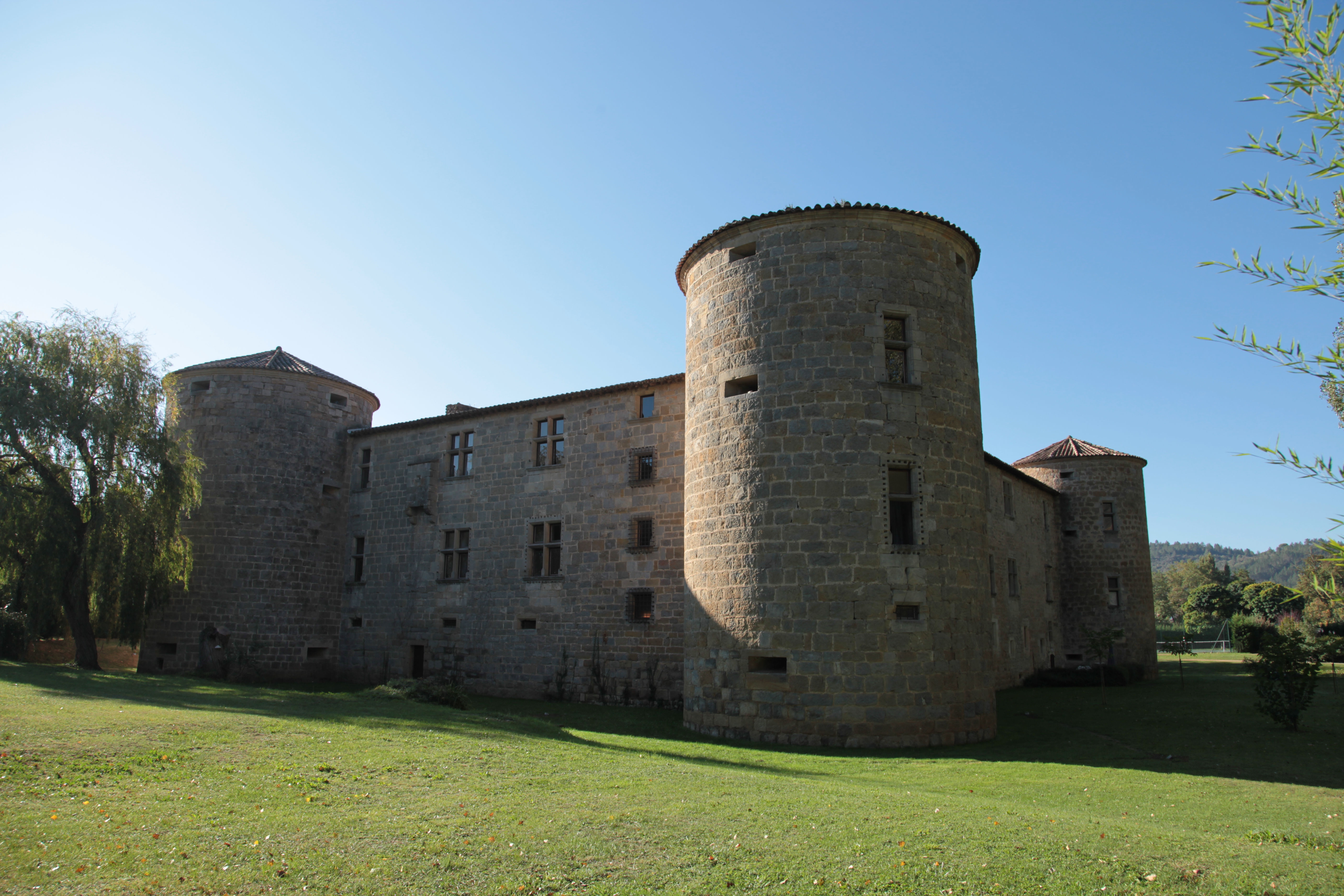 Château des Ducs de Joyeuses, commune de Couiza, Aude, France.